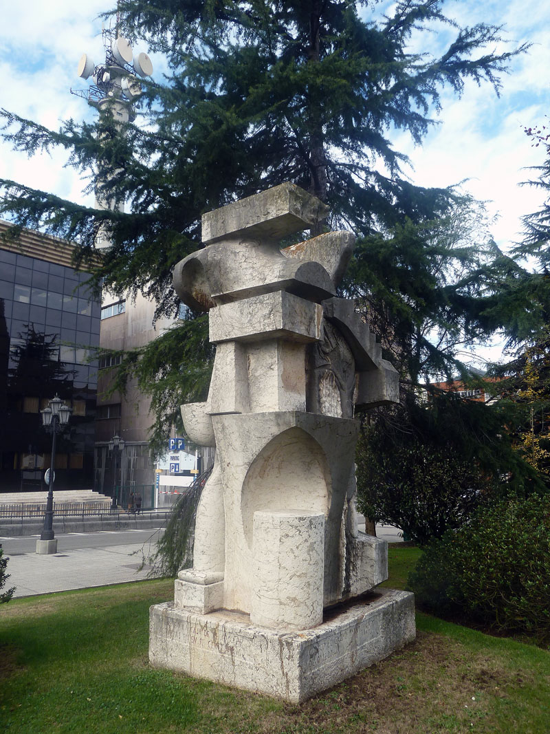 Autor.- J. Antonio Nava, 1980. Calle Alferez Provisional.